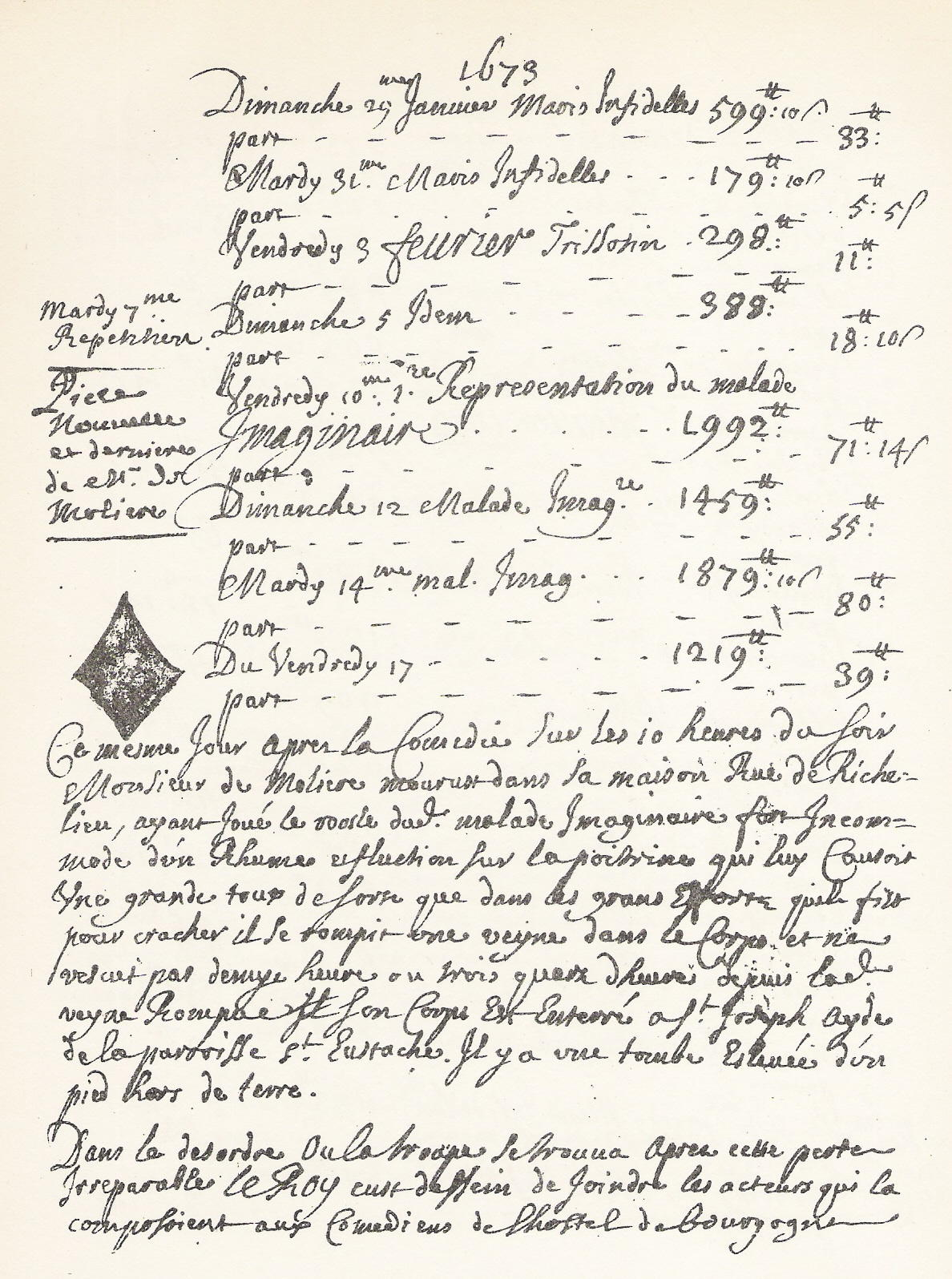 Page du registre de La Grange, 1673. Numérisée par Huster.